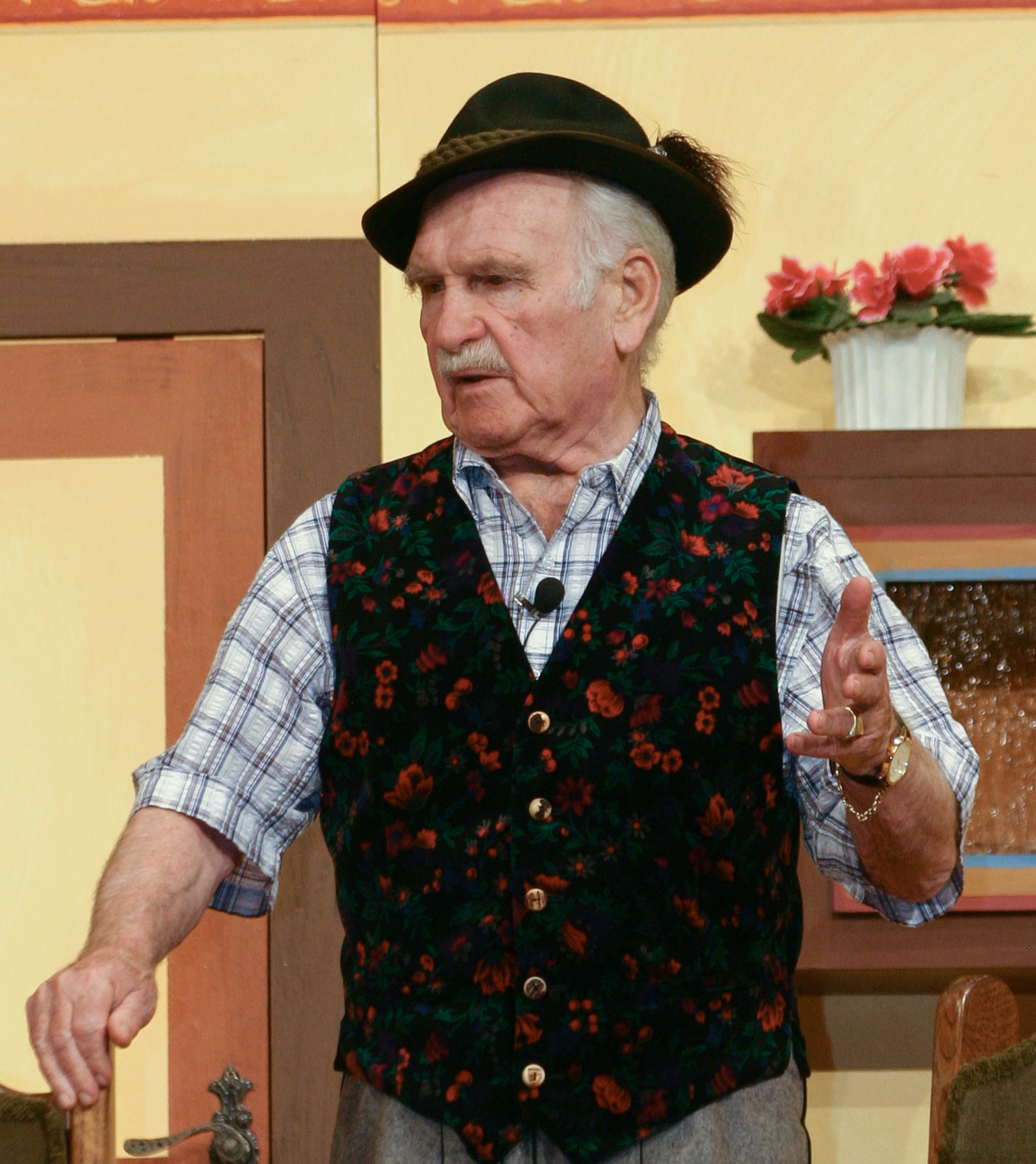 Peter Steiner (* 6. September 1927 in München; † 22. Dezember 2008 ebenda) war ein bayerischer Volksschauspieler. Steiner ist Namensgeber des Peter Steiners Theaterstadls.